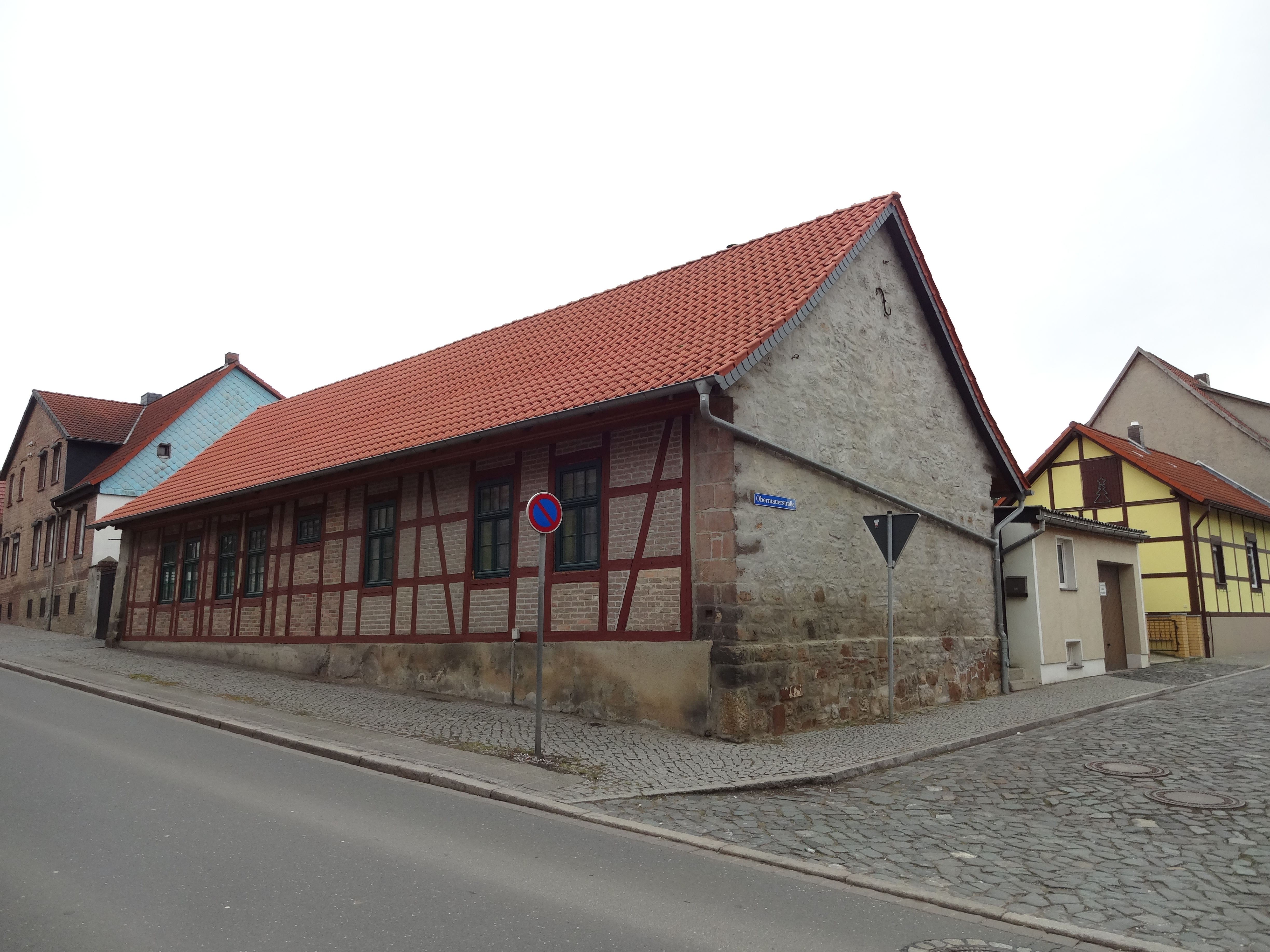 denkmalgeschütztes Fachwerkhaus in der Obermauerstraße 1 in Derenburg, Ortsteil von Blankenburg (Harz)